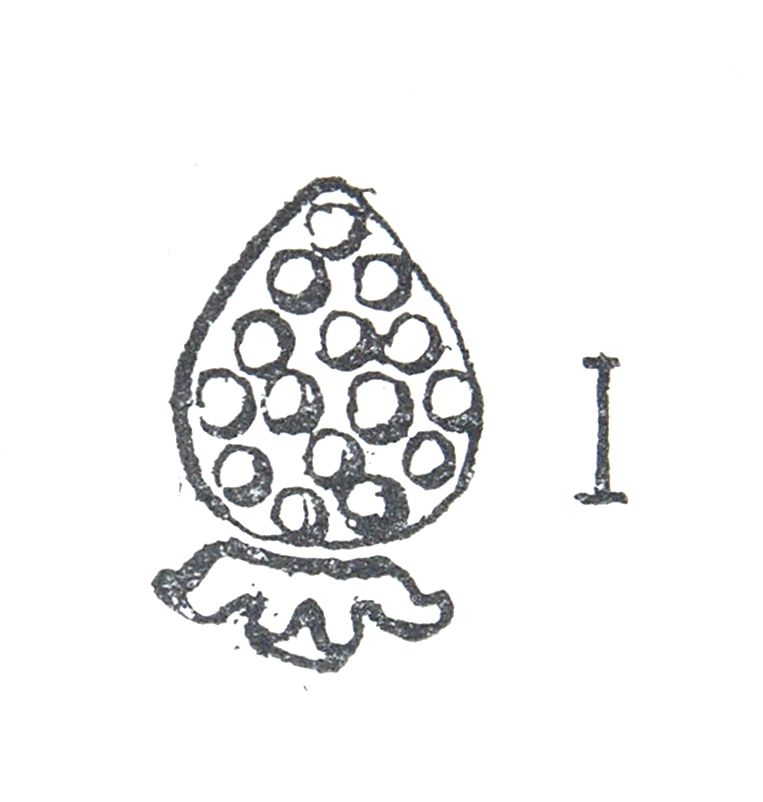 Zeichen auf dem Gobelet d'André Falquet (Kunstgegenstand)